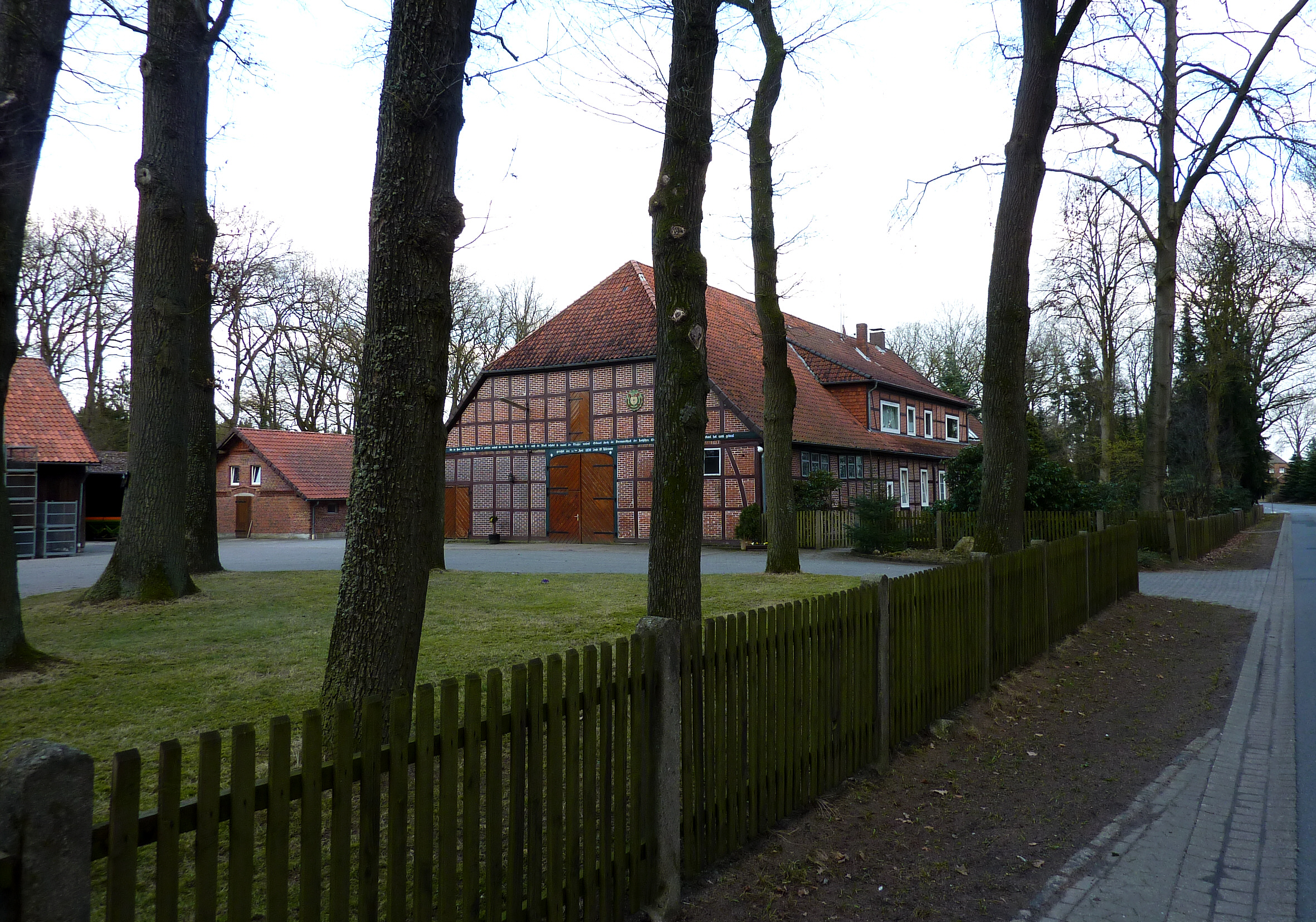 Bauernhaus mit Fachwerk in Reddingen, Ortsteil von Wietzendorf, Landkreis Heidekreis.